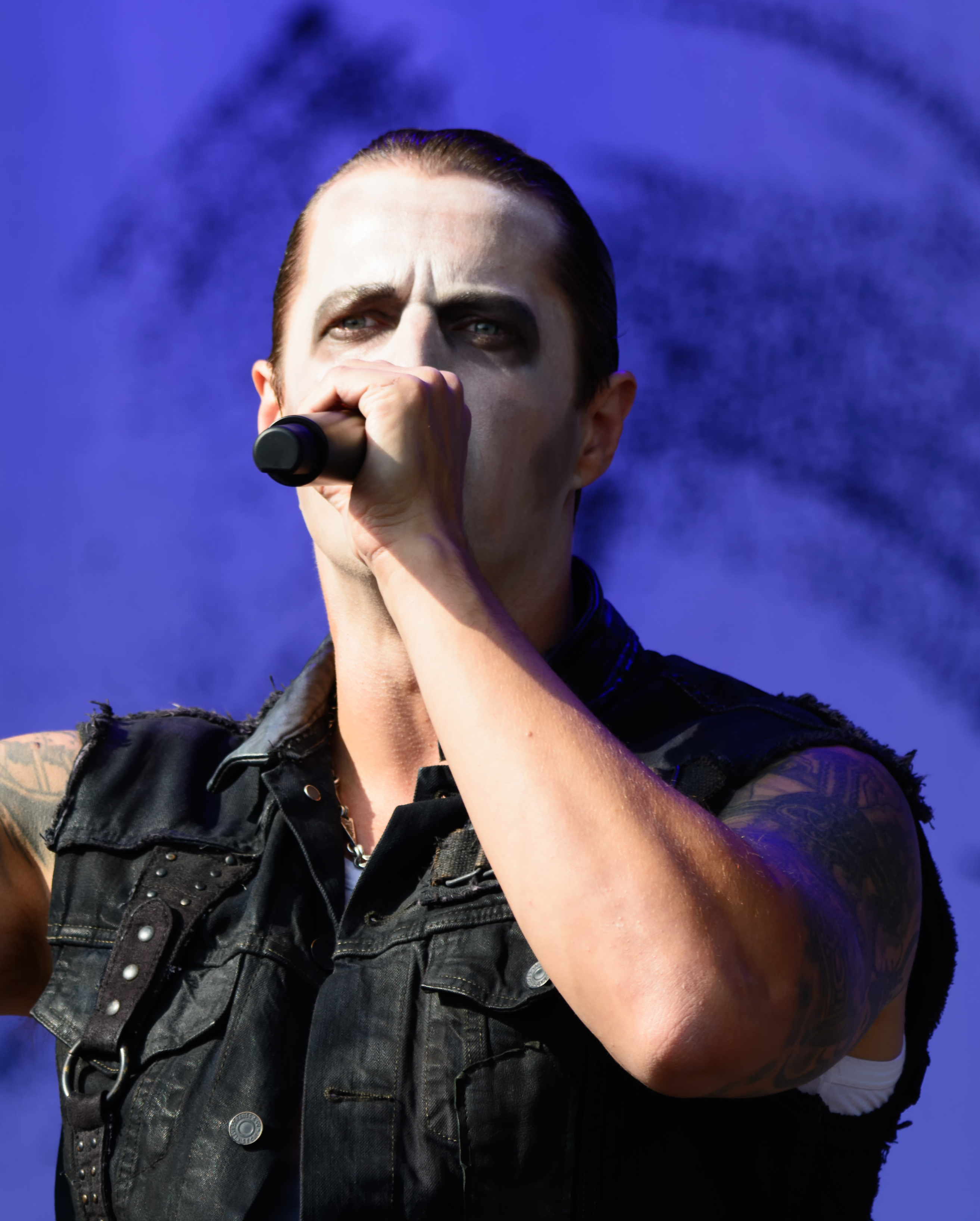 Satyricon beim Elbriot 2018